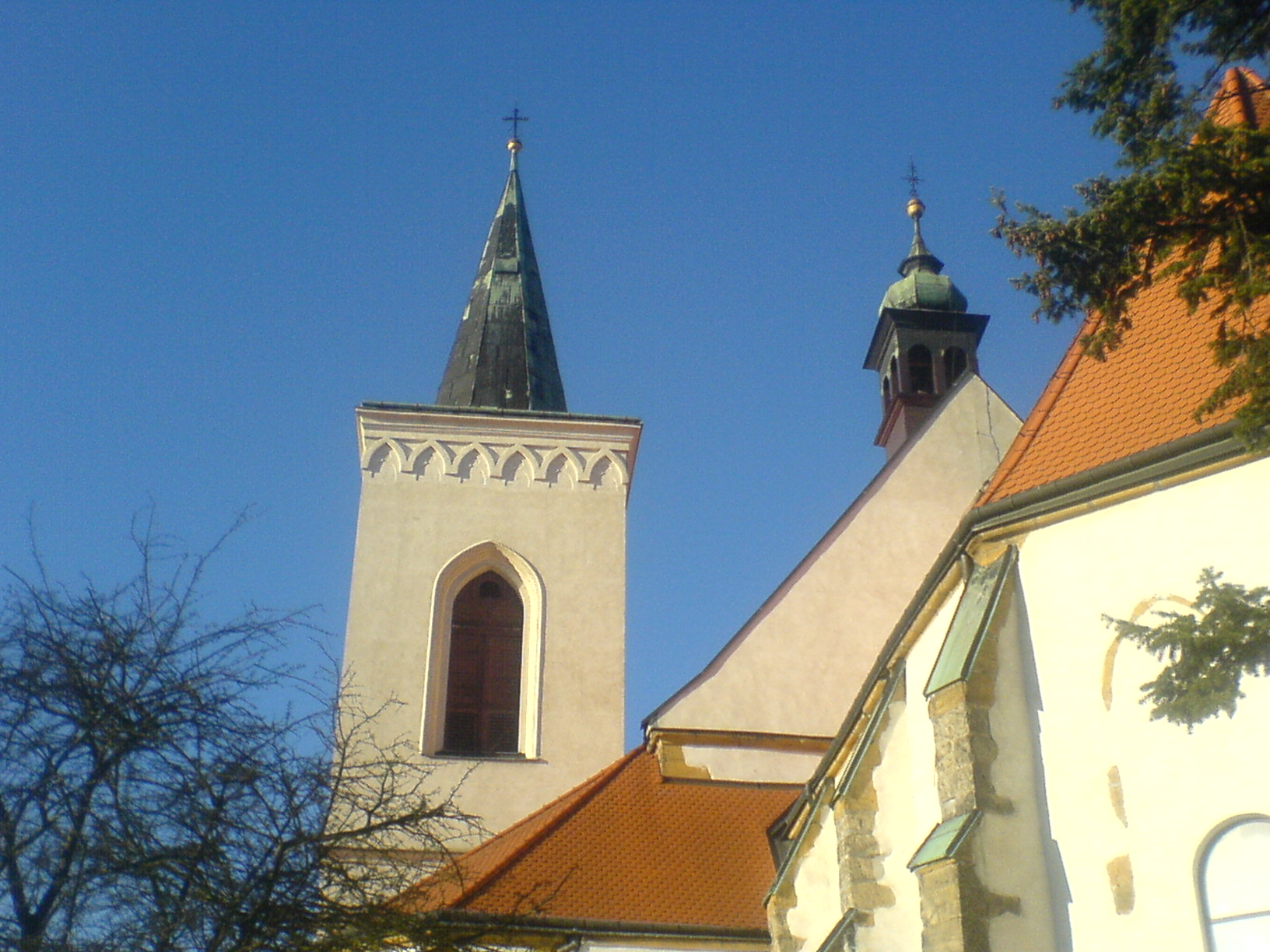 kostel sv. Prokopa Letovice